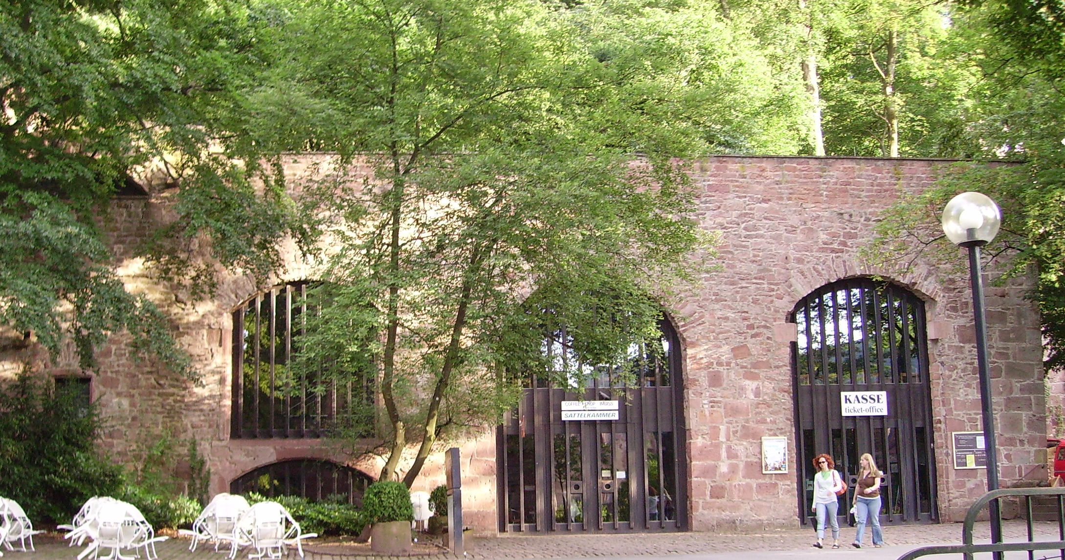 Heidelberger Schloss